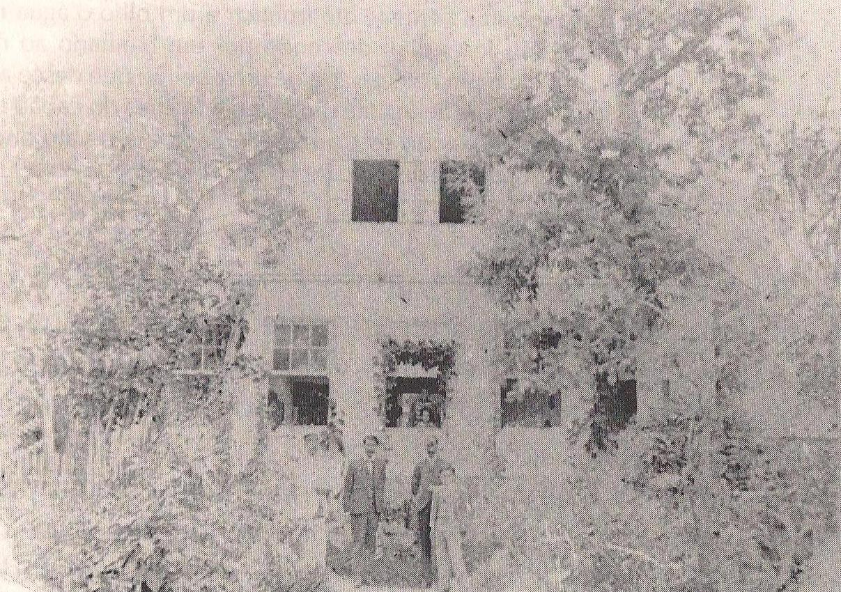 Antiga Fazenda Boqueirão (Curitiba)